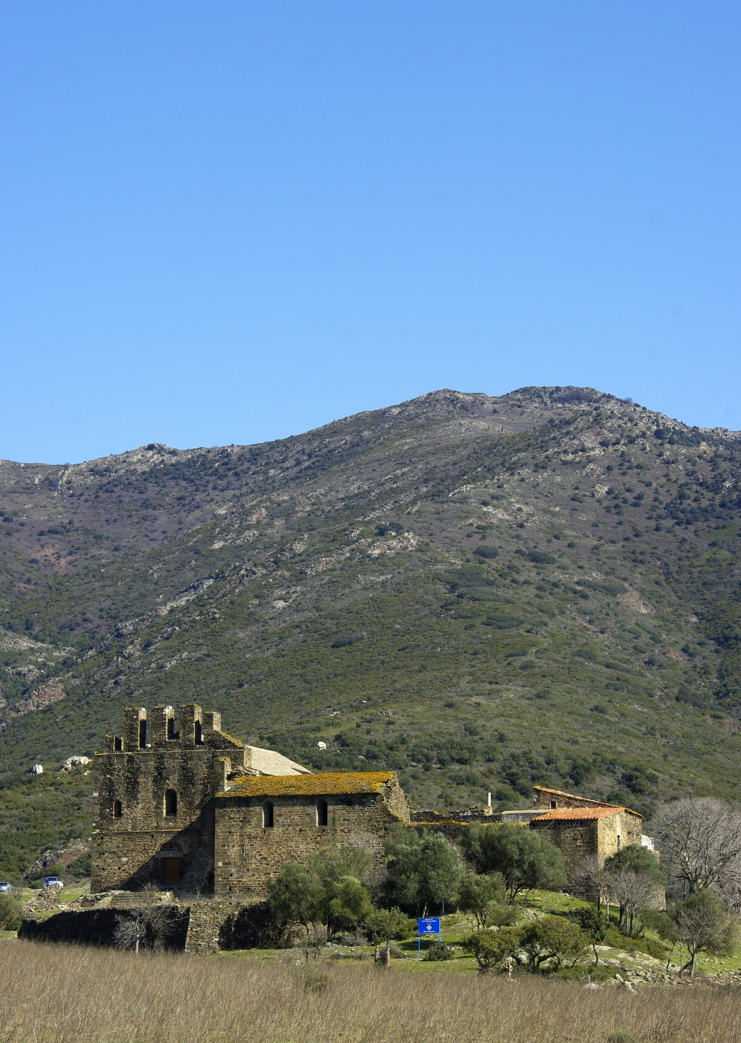 Monestir de Sant Quirze de Colera (Rabós)